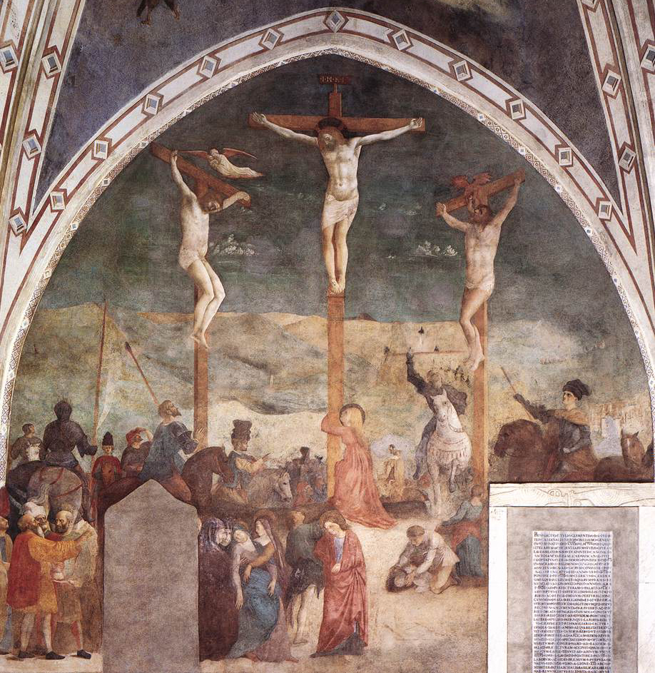 MASOLINO da Panicale Crucifixion Fresco Cappella del Sacramento, San Clemente, Rome